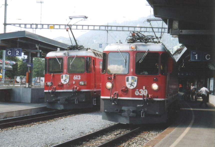 Zwei Lokomotiven der Rhätischen Bahn, Baureihe RhB Ge 4/4 II im Bahnhof von Klosters. Rechts Lokomotive 630 (Trun) im Zustand vor der bei diesen Maschinen durchgeführten Runderneuerung, links dahinter die bereits umgebaute Ge 4/4 II 613 (Domat/Ems) mit den eckigen Scheinwerfern und einer veränderten Position der Fahrzeugnummer an der Stirnseite.